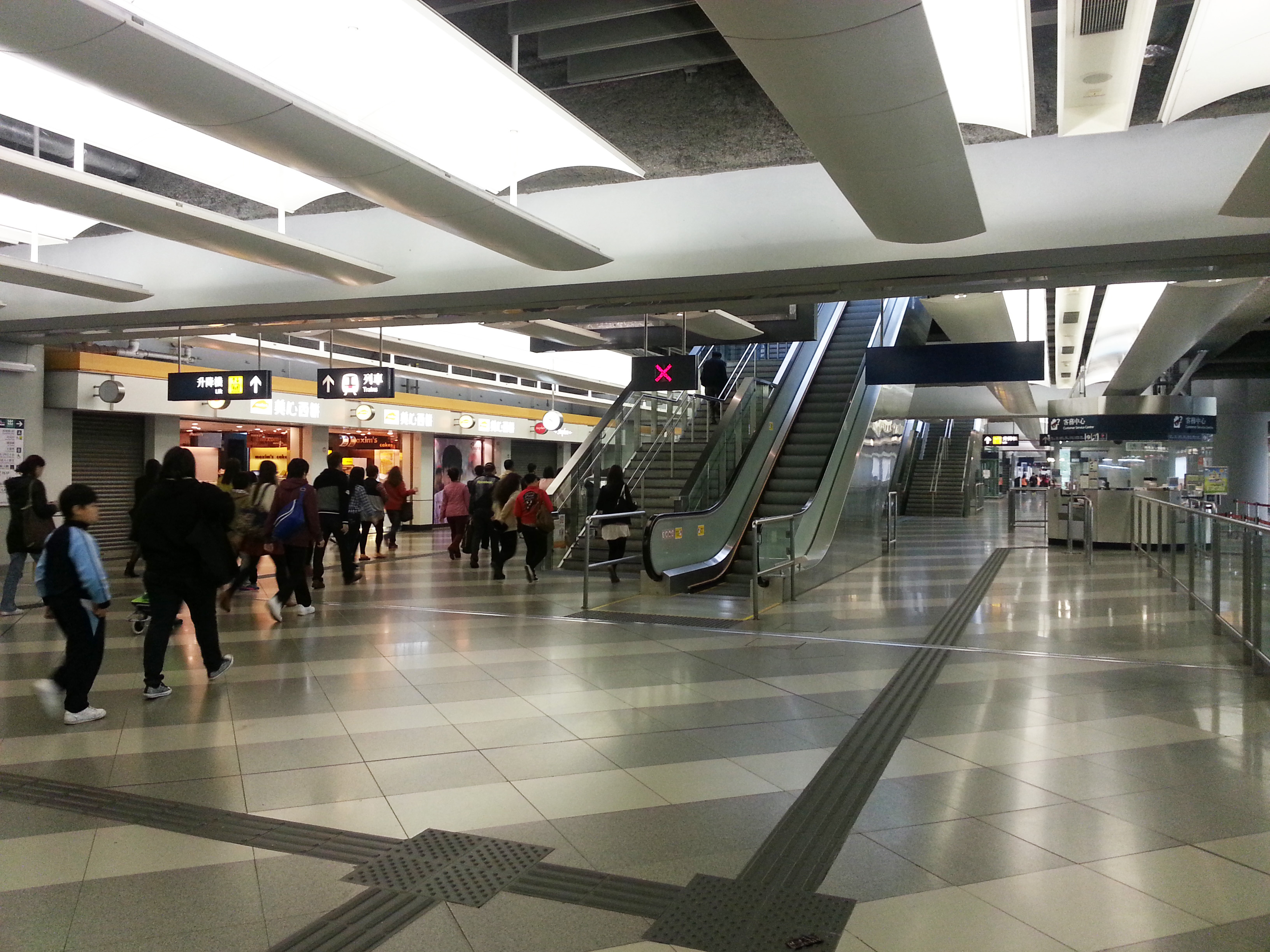 港鐵天水圍站大堂